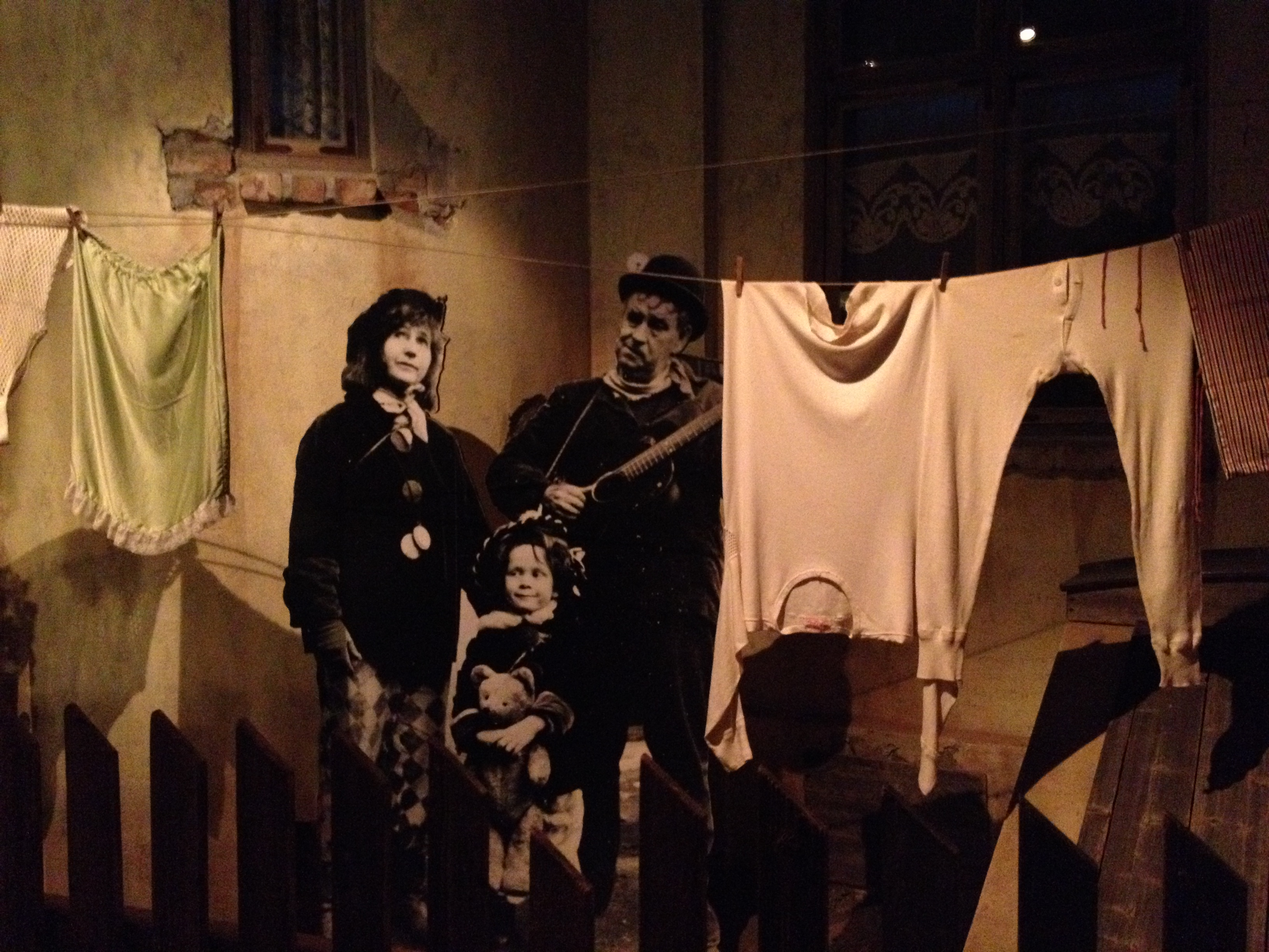 From exhibitions at Prøysenhuset, museum to Alf Prøysen , in Ringsaker Norway, model of Kanutten og Romeo Clive